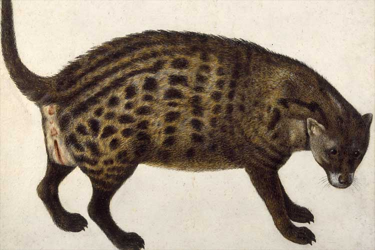 Afrikanische Zibetkatze